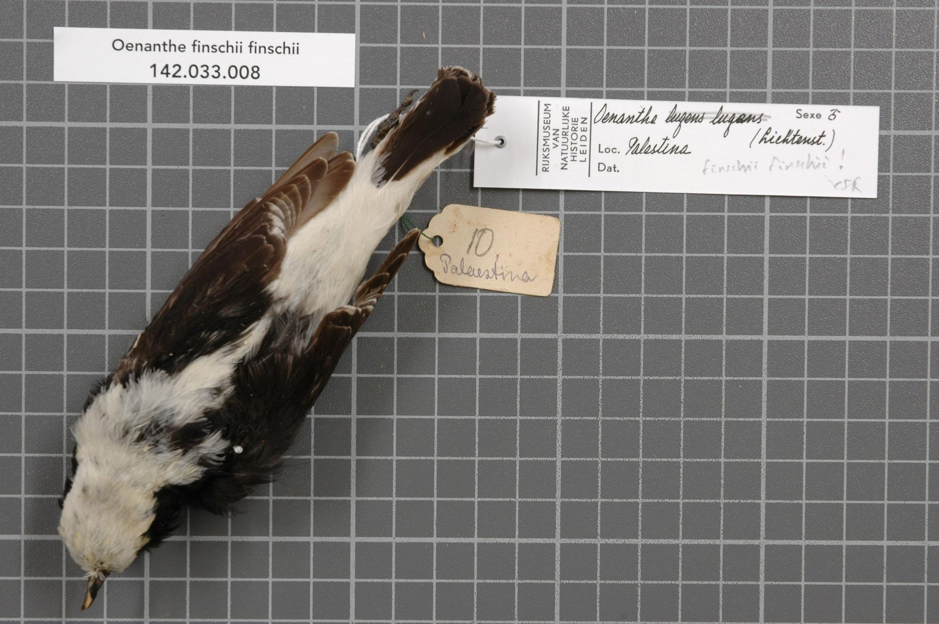 Oenanthe finschii finschii (Heuglin, 1869)